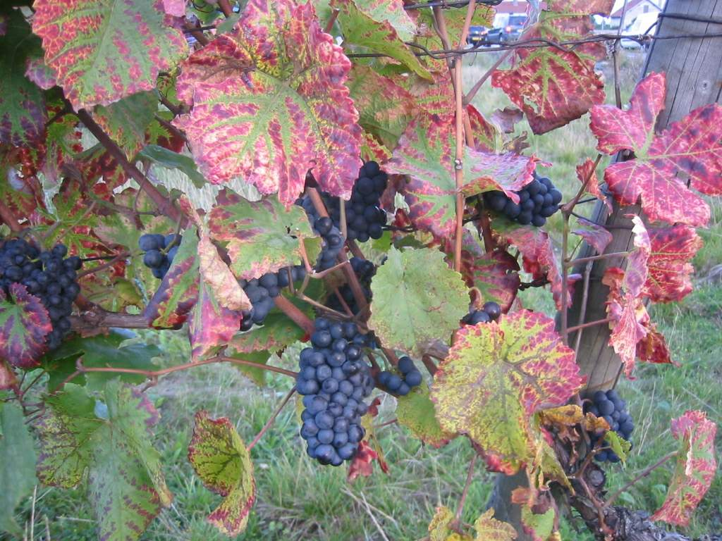 Vigne Marsannay la Cote Bourgogne 8